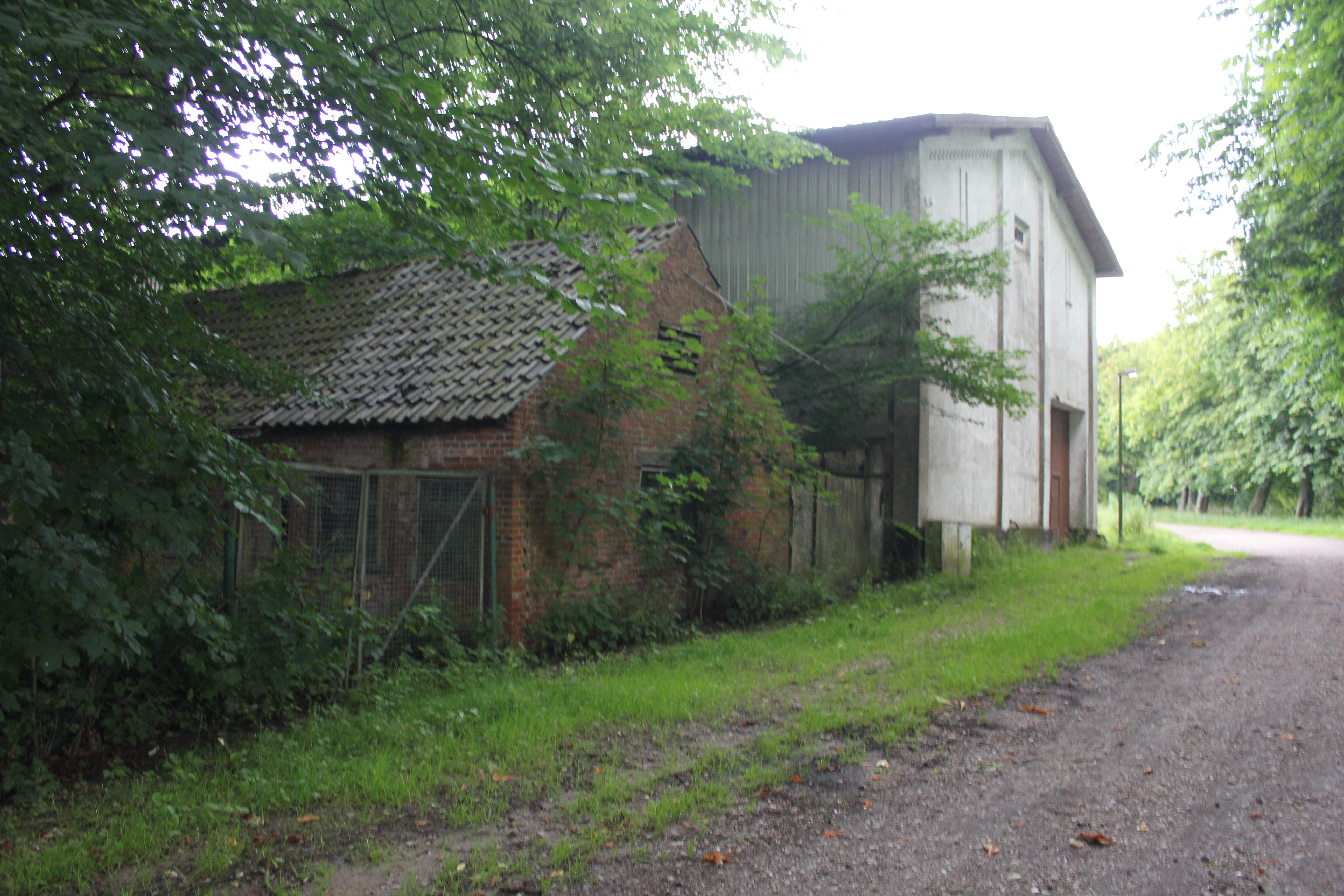 Trögelsbyhof Nr 5 (Flensburg-Trögelsby Juli 2014), Bild 01